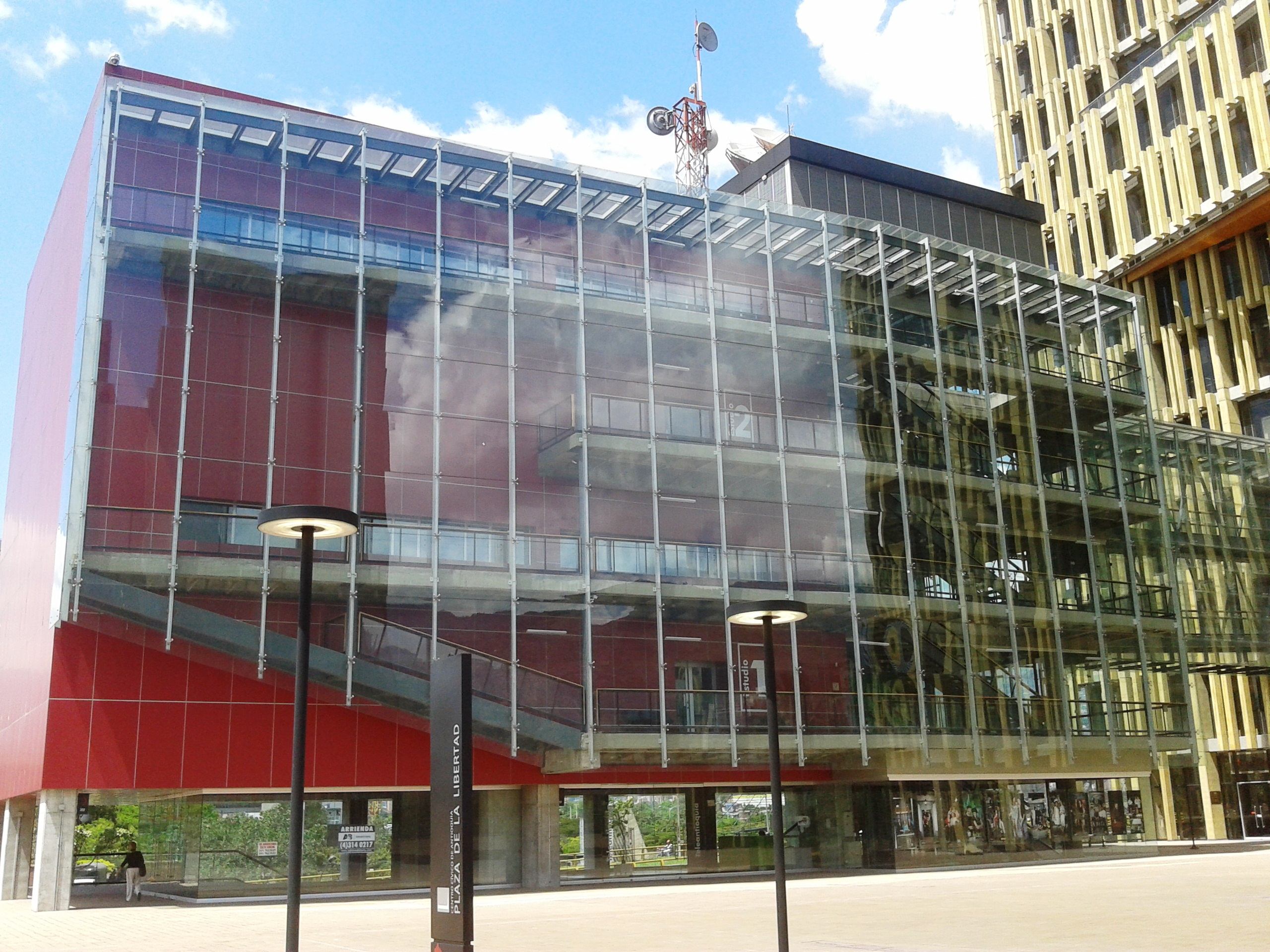 Estudios del canal Teleantioquia en Medellín